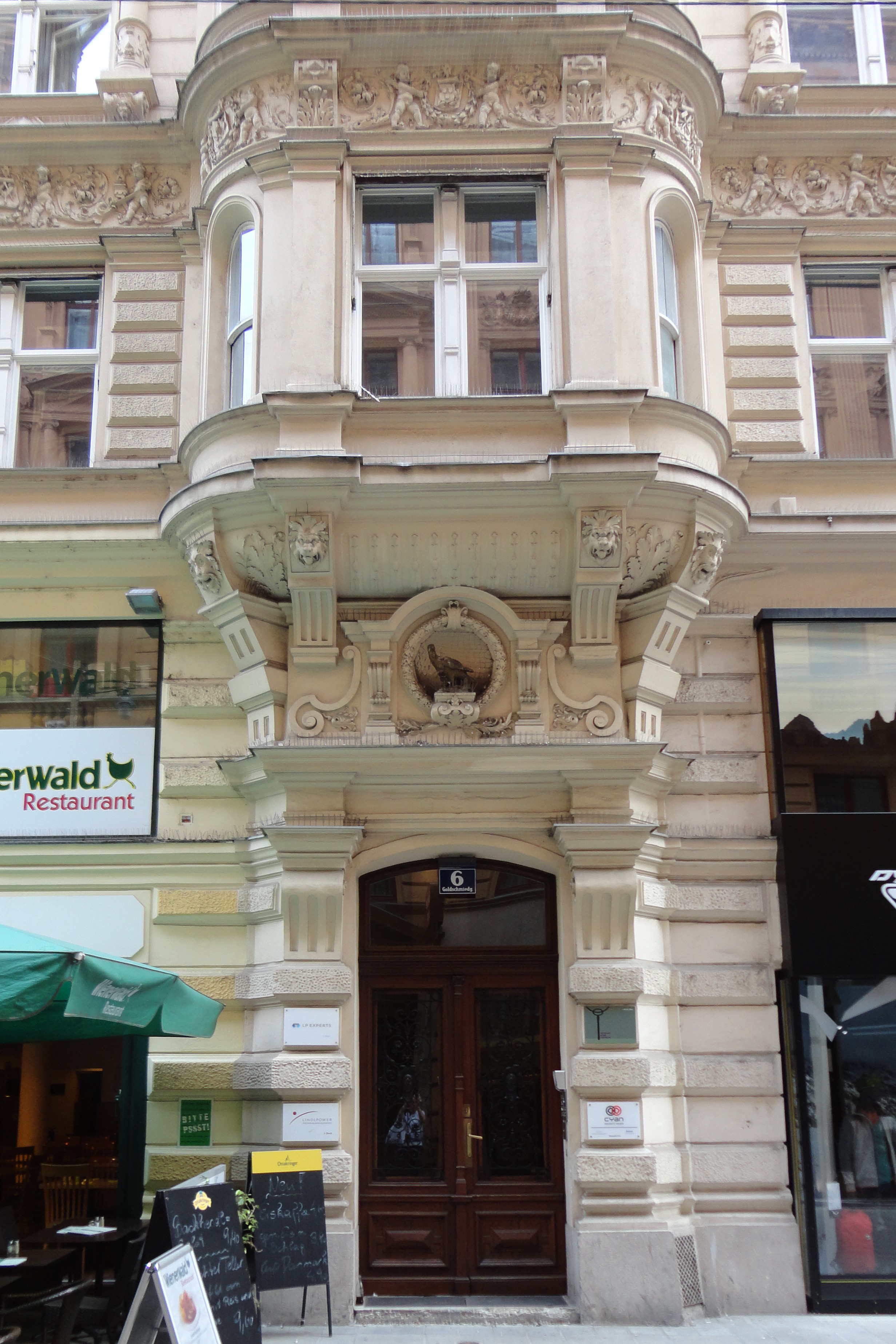 Das Haus Rebhuhn in Wien (Goldschmiedgasse 6), wo Wilhelm Steinitz in seiner Wiener Jugendzeit wohnte.